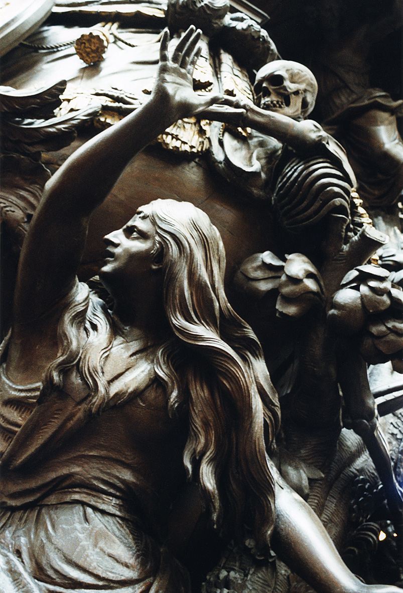 Détail de la chaire en bois sculpté,représentant Adam et Eve chassés du Paradis Terrestre.Cathédrale Saint Michel,Bruxelles. Auteur: Hendrik Frans Verbruggen